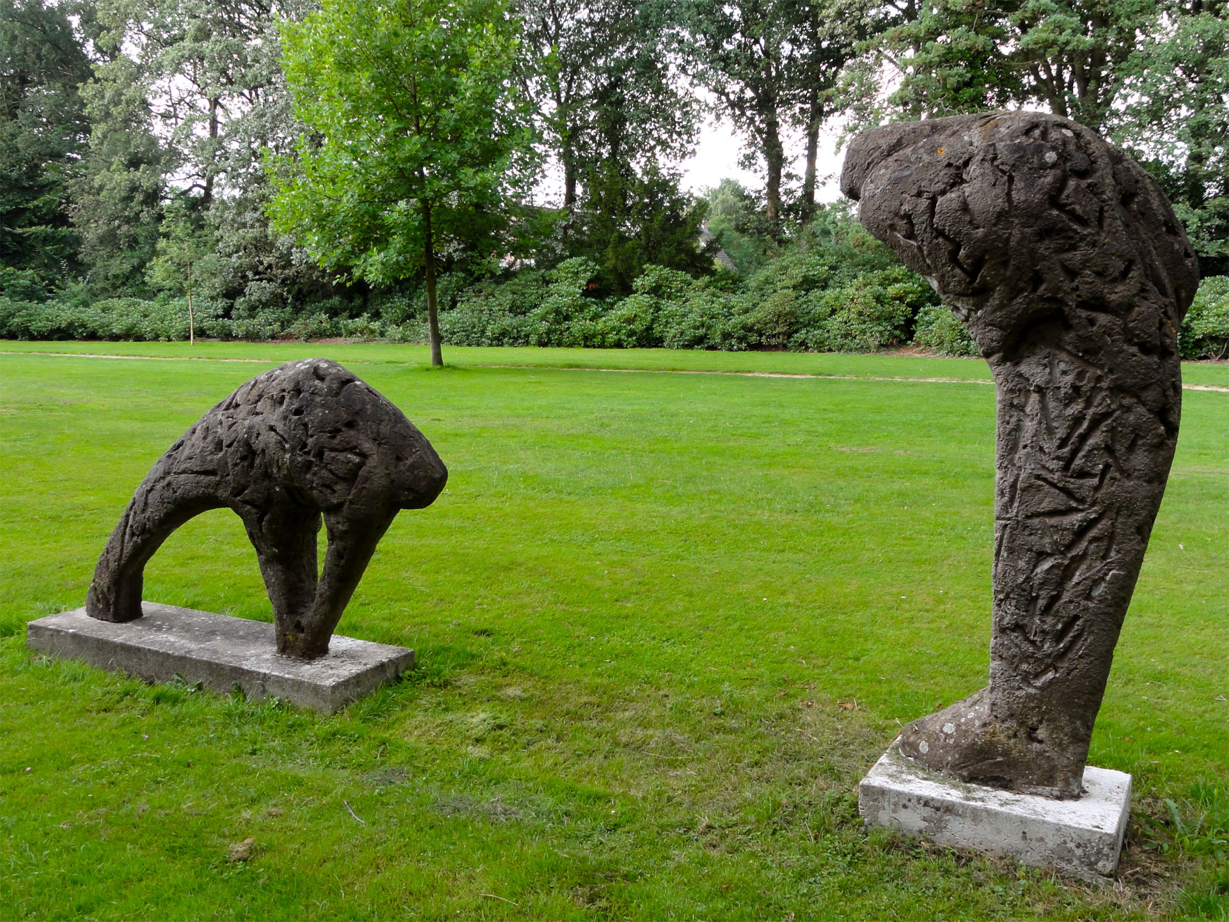 De Eierzoekers door Frank Zeilstra in het park bij het gemeentehuis te Beetsterzwaag